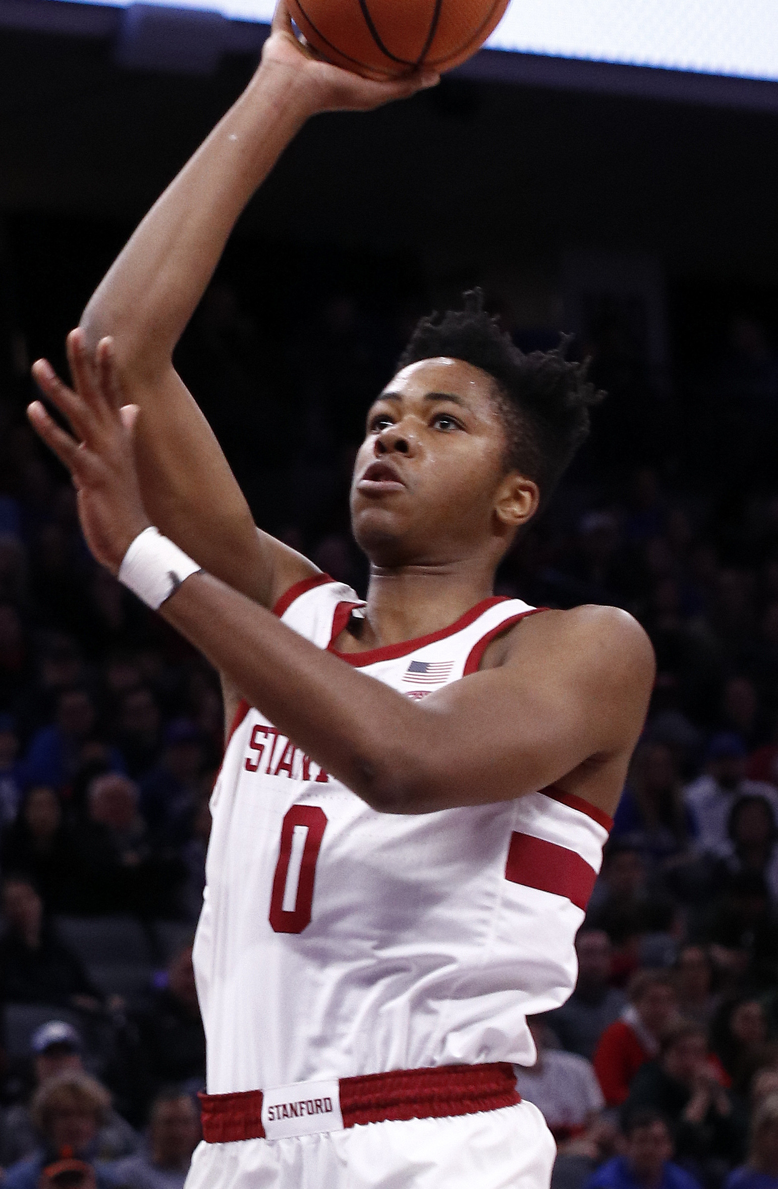 Kezie Okpala